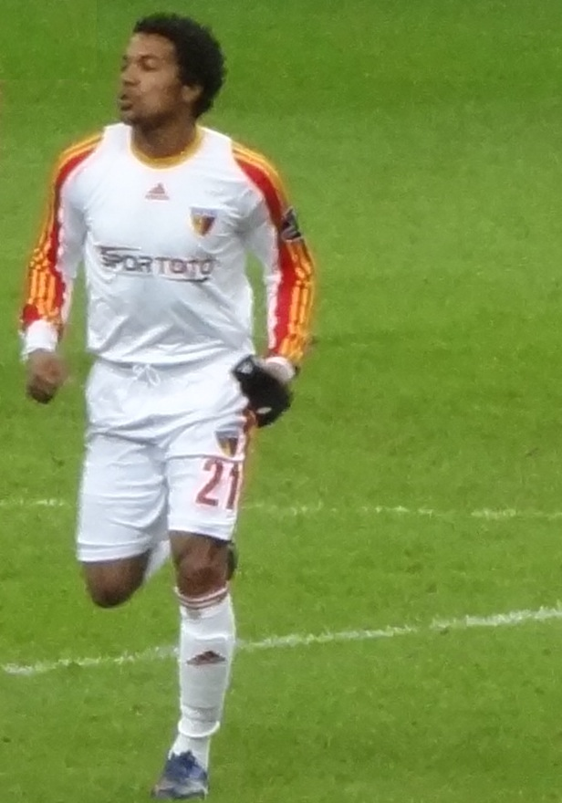 Bisewar Galatasaray deplasmanında